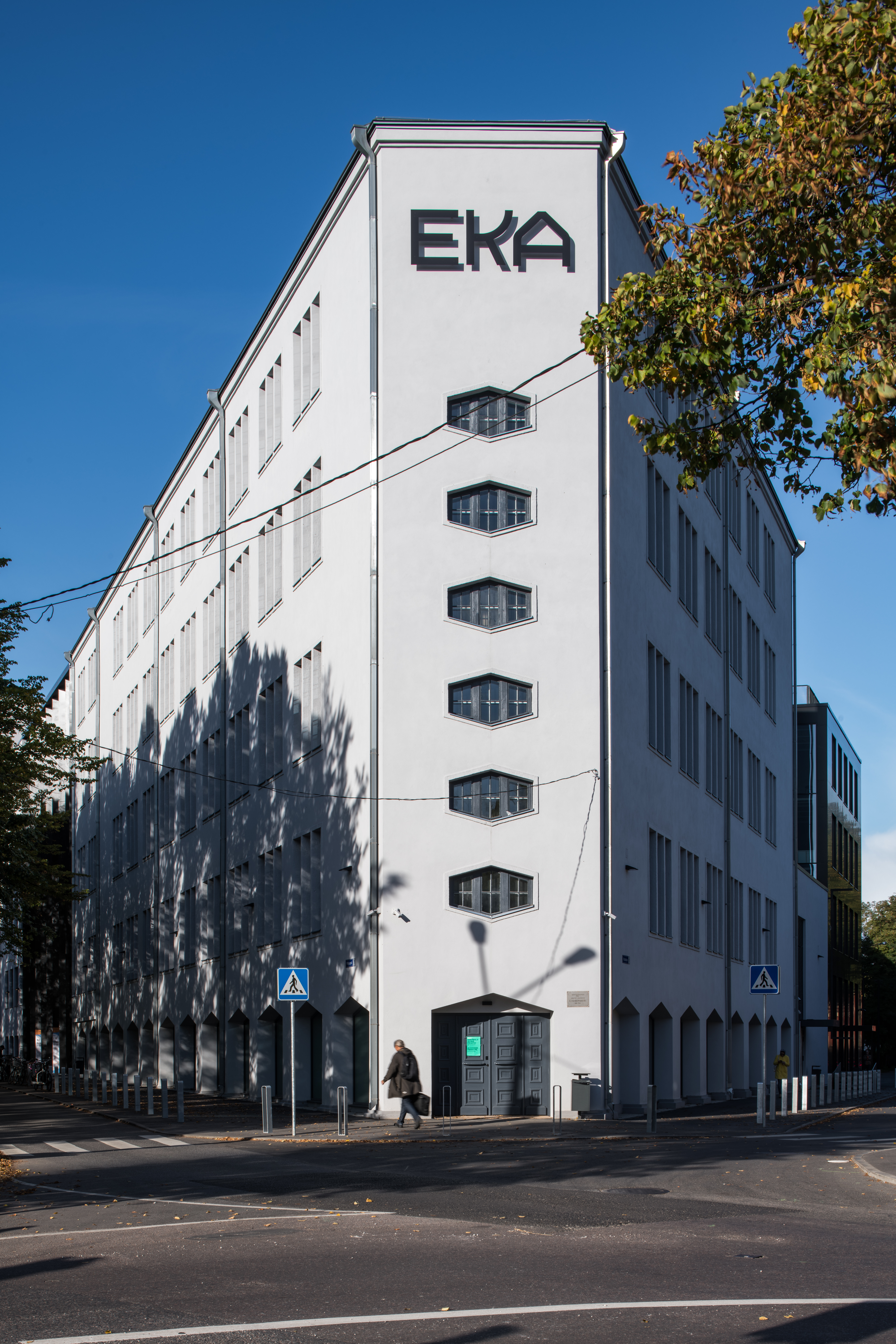 Avatud 2018. aastast. Arhitektuur: filosoof ja EKA õppejõud Eik Hermann ning EKA vilistlased Koit Ojaliiv, Joel Kopli, Juhan Rohtla (KUU Arhitektid) Foto: Tõnu Tunnel